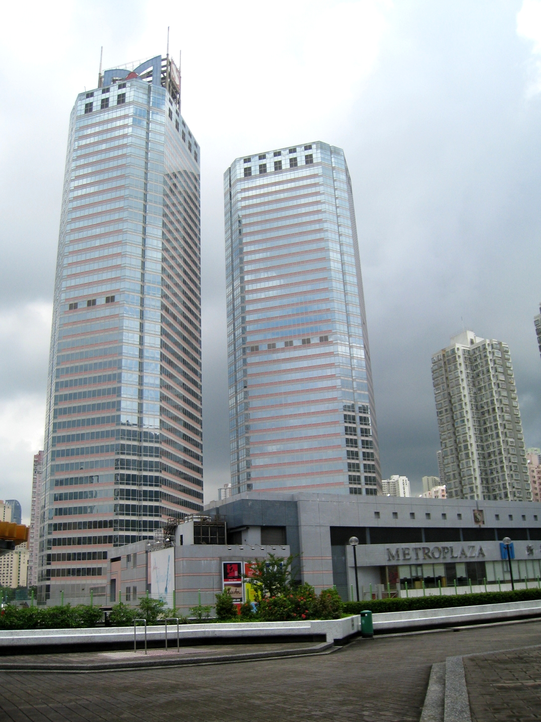 HK MetroPlaza 新都會廣場